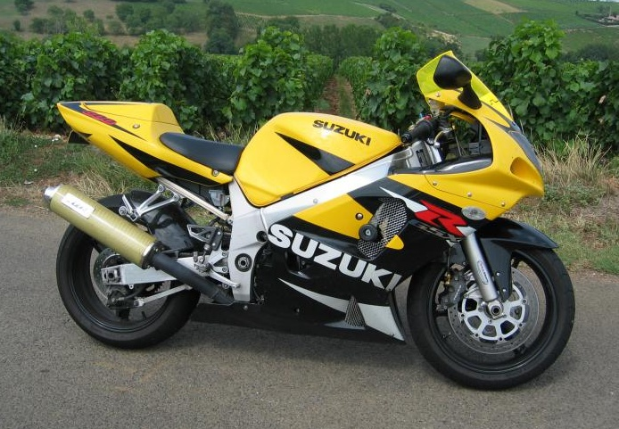 600 GSXR 2001 jaune et noir